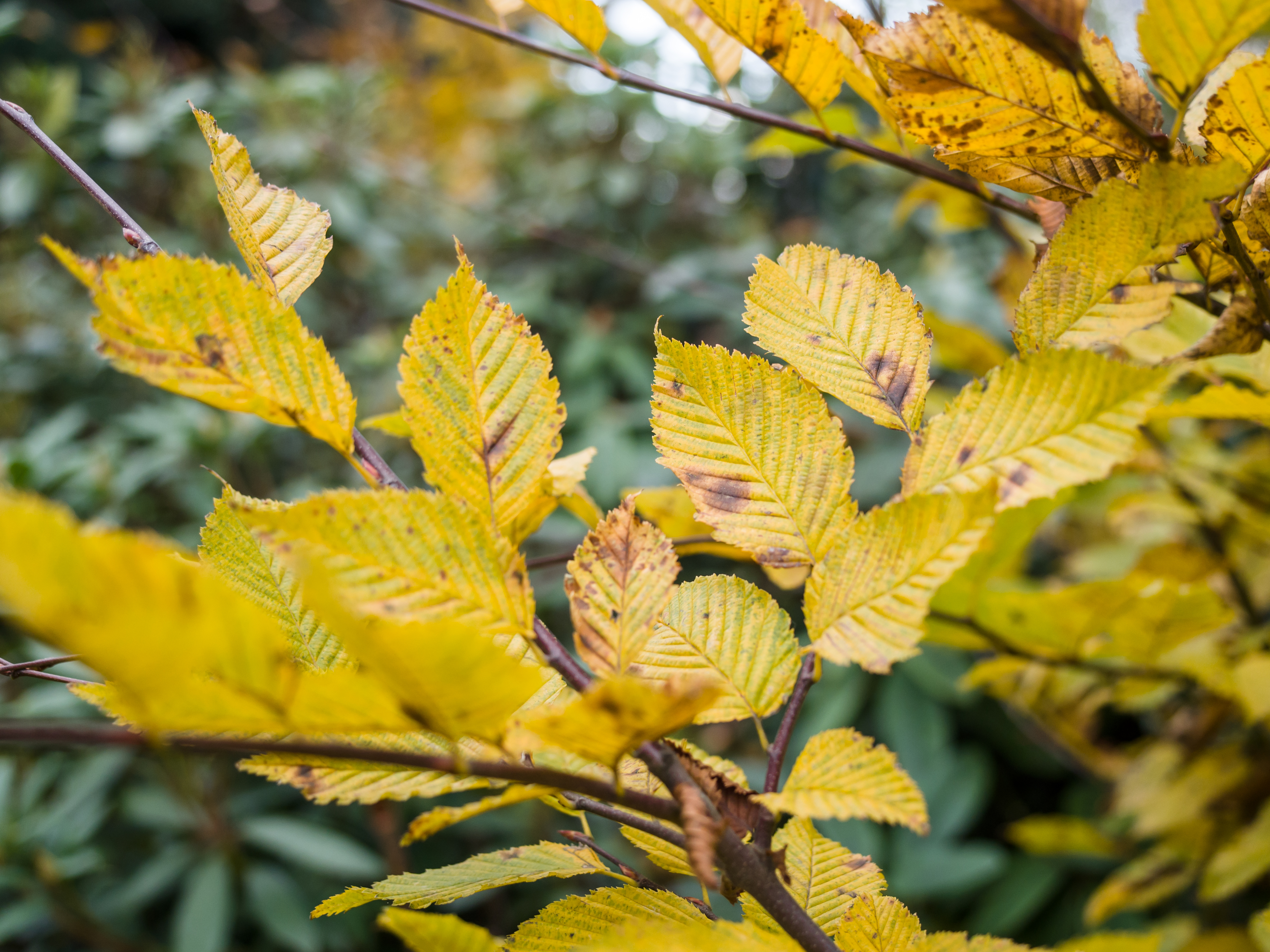 Ruskin Park, London